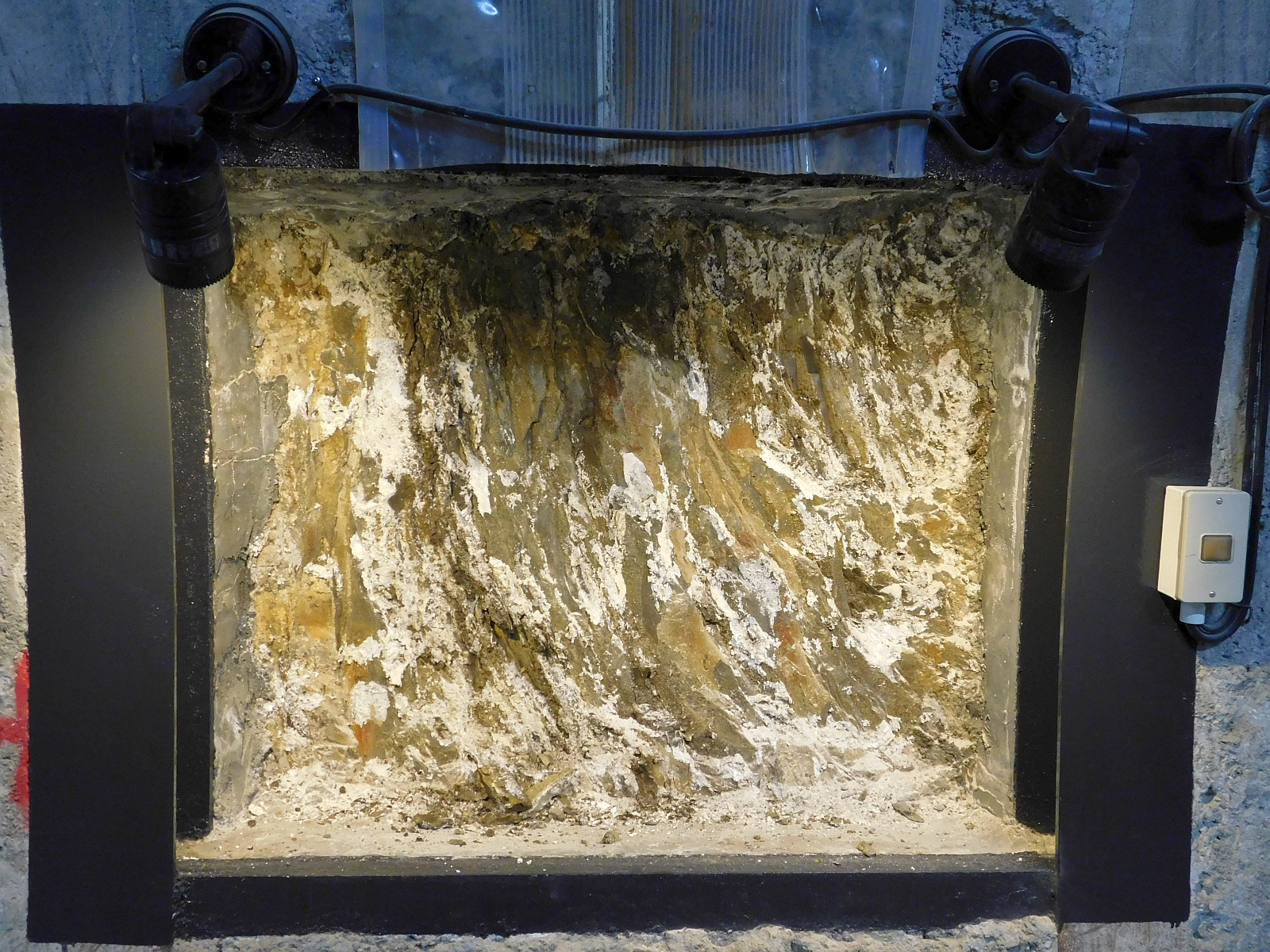 幌延深地層研究センター深度350m調査坑道にある「幌延の窓」。約500～400万年前に海底に堆積した珪質泥岩からなる稚内層。